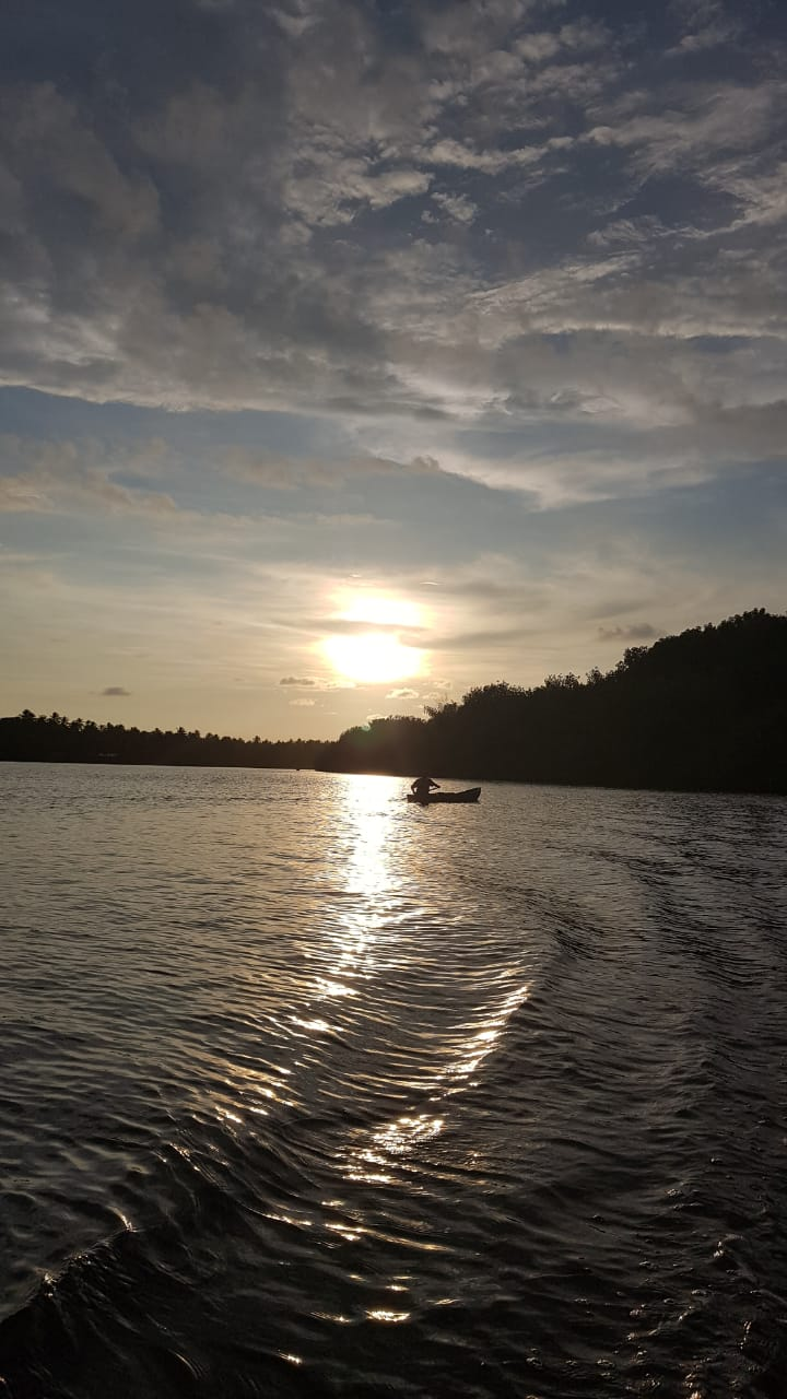 Camino a manglares de la Barra de Santiago en lancha.